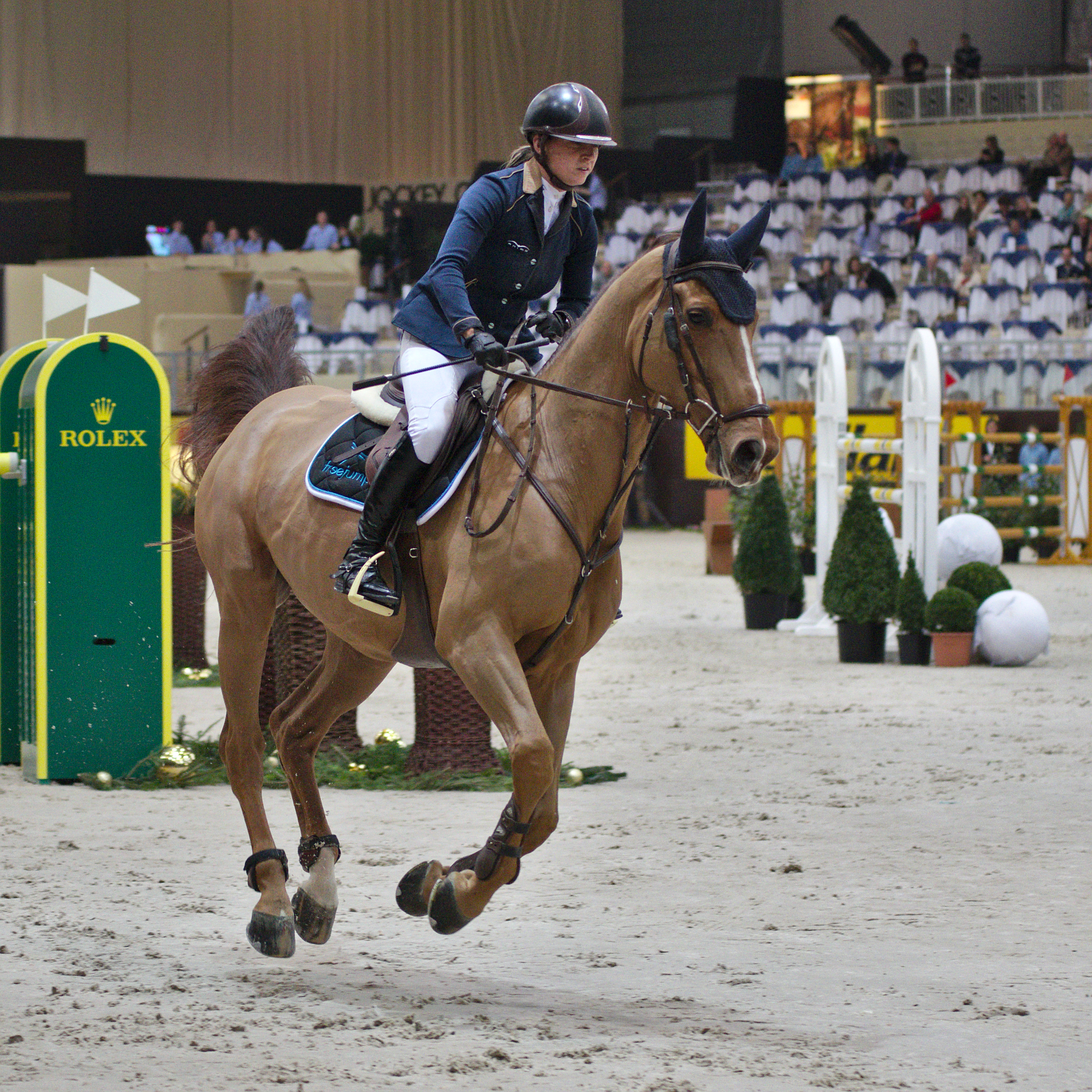 CHI Genève 2013 - 20131214 - Katharina Offel et Lacontino